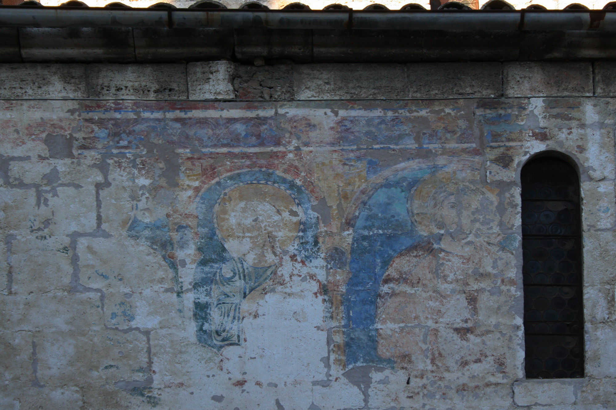 Chiesa di San Vittore di Ascoli Piceno, affresco sul muro perimetrale esterno di destra , immagine diurna, proprio scatto Sibilla.io "Utilizzo concesso" Ticket#2007040410014627 (ticket per le immagini) This file is licensed under Creative Commons 3.0 license